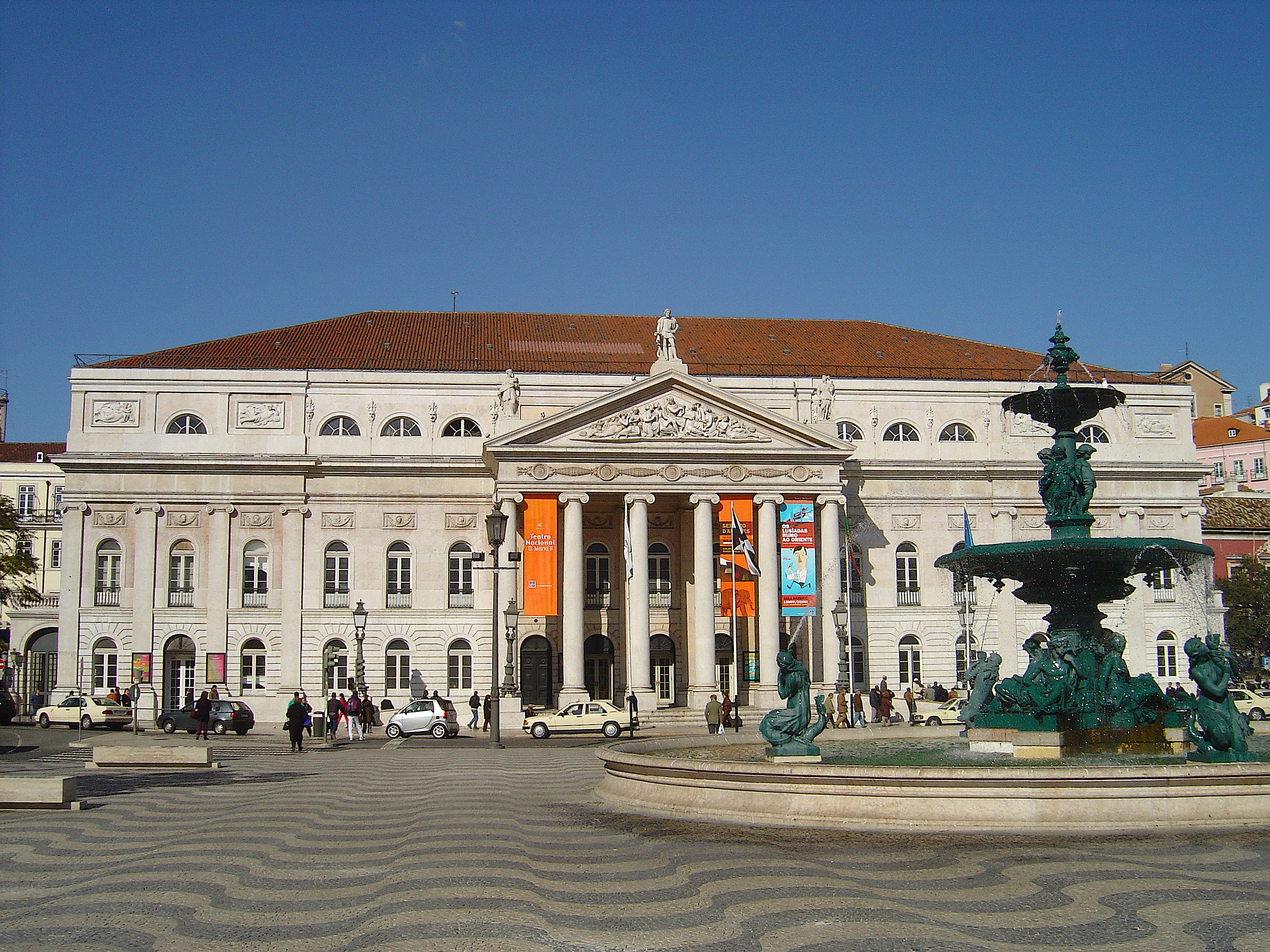 Teatro Nacional D. Maria II, Praça do Rossio, Lisboa Pça. do Rossio - Lisboa (Portugal)